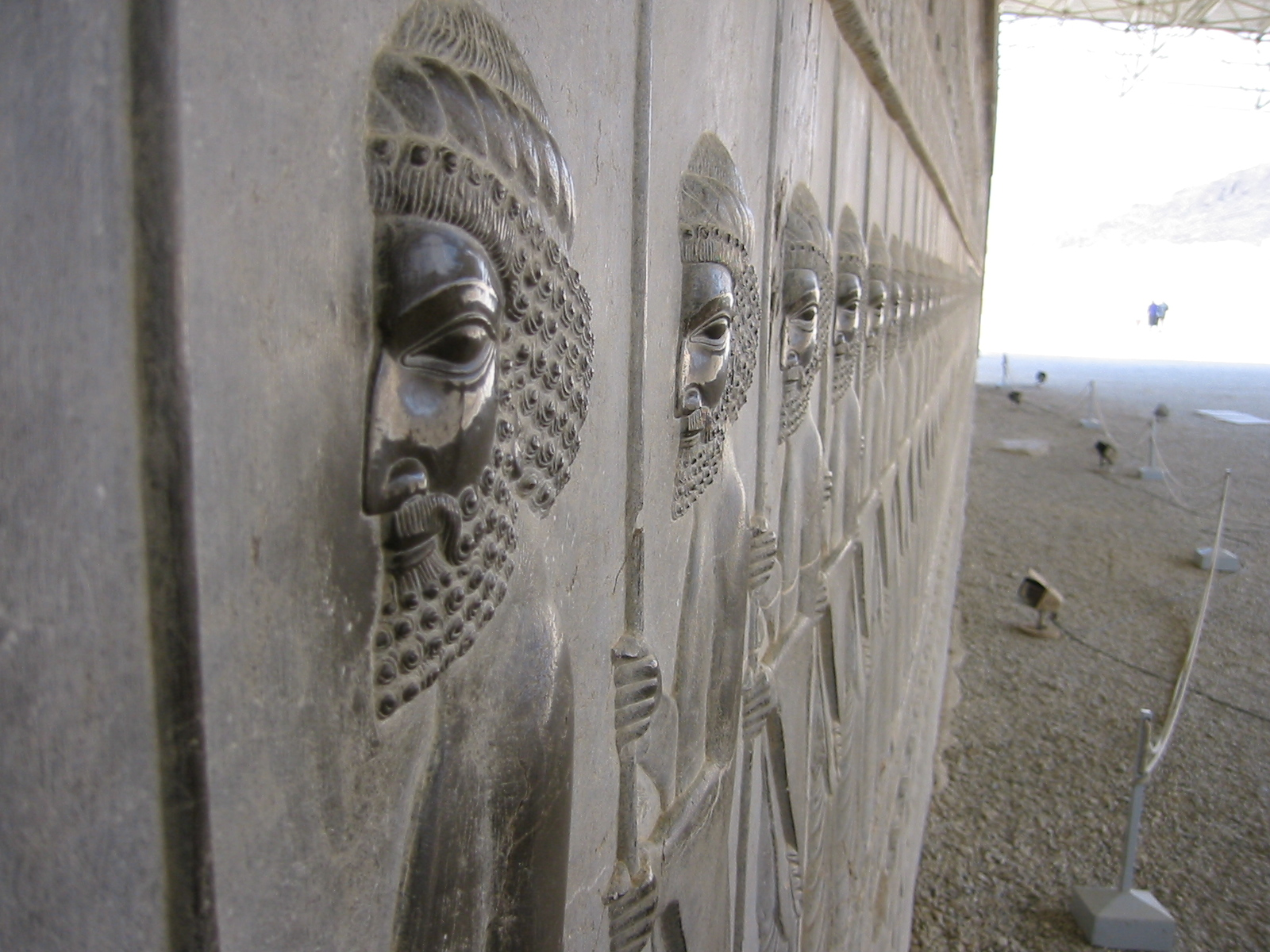 fotos van mijn zus, aan mij gegeven voor Wikipedia.. GerardM 5 feb 2007 22:44 (CET)